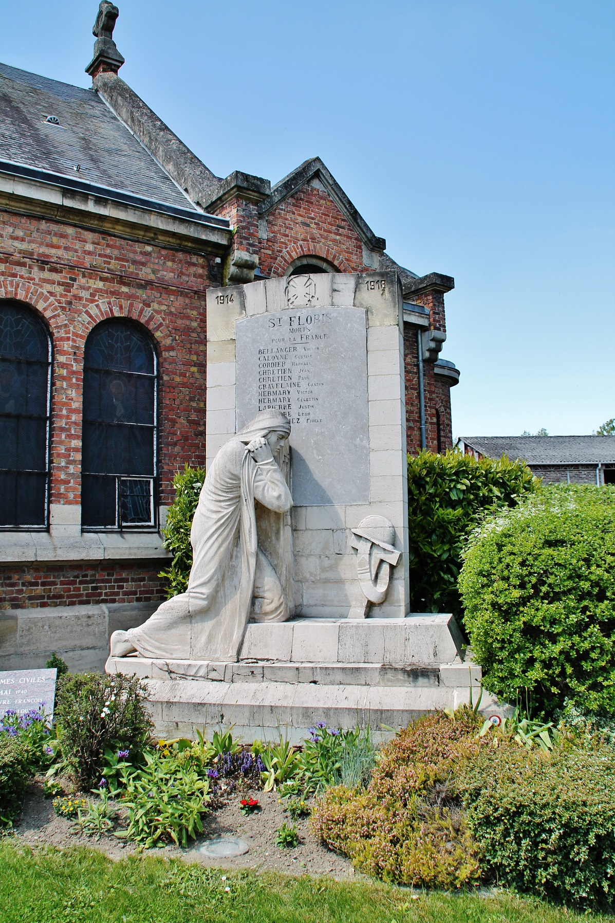 Monument aux Morts